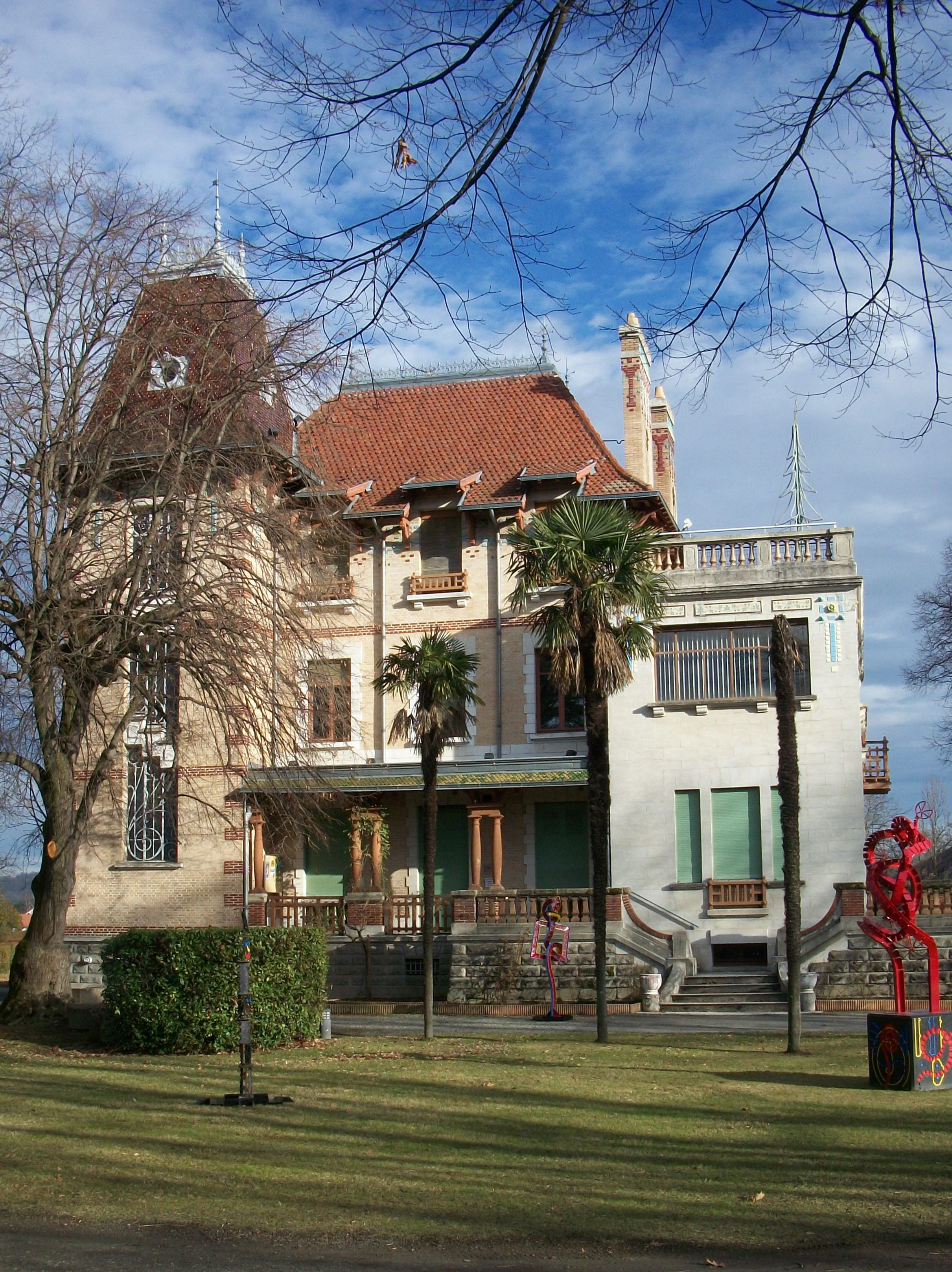 Villa Oustau (Aureilhan, Hautes-Pyrénées, France)